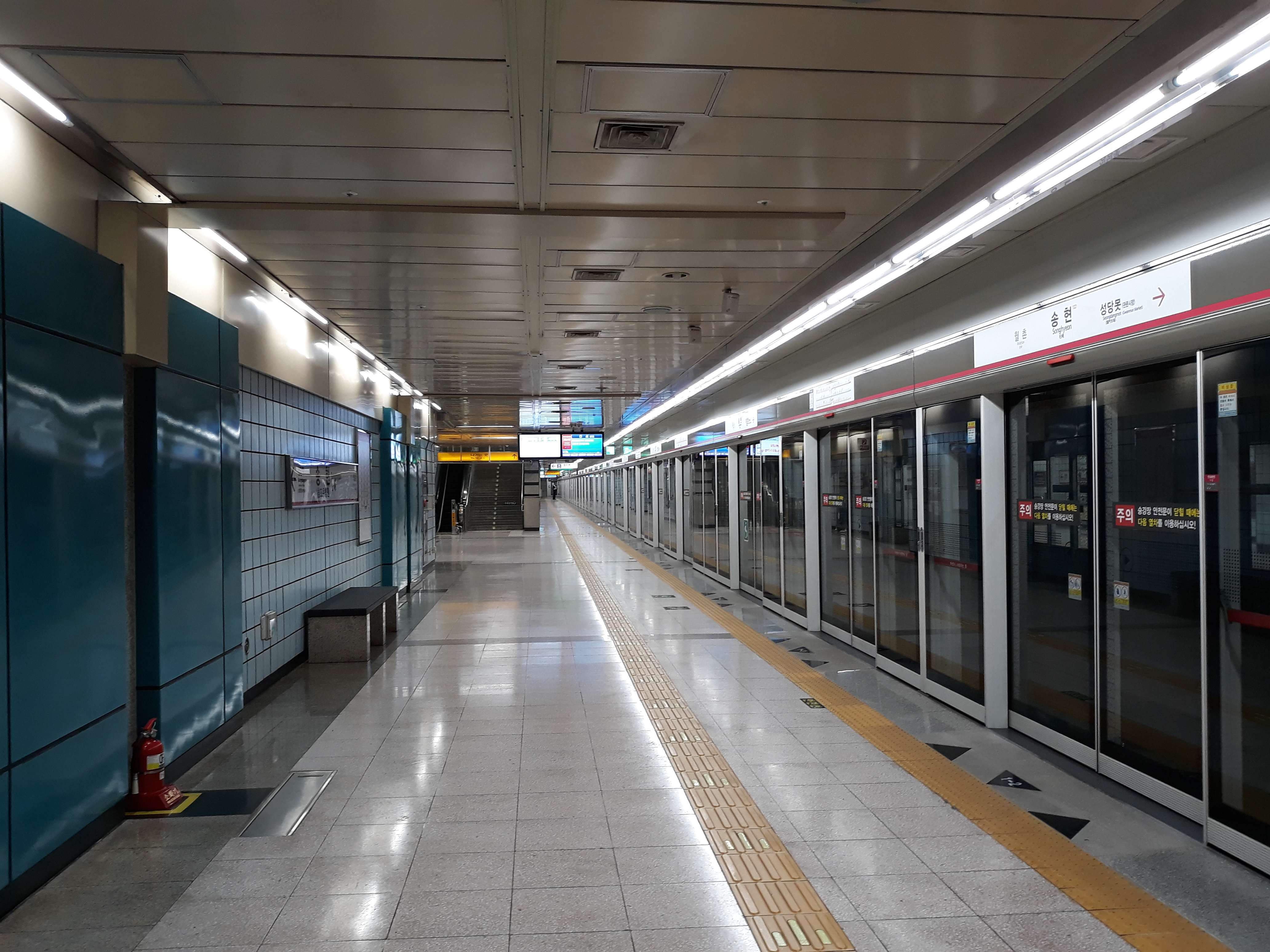 대구 도시철도 1호선 송현역 안심 방면 승강장